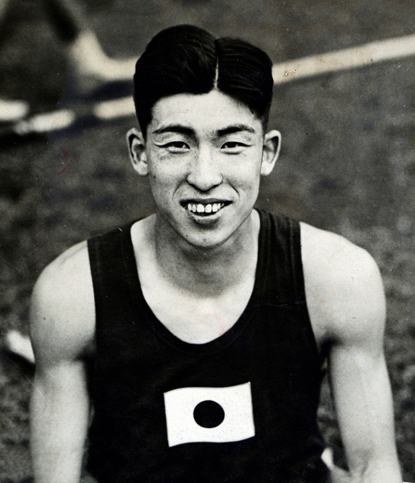 Shuhei Nishida